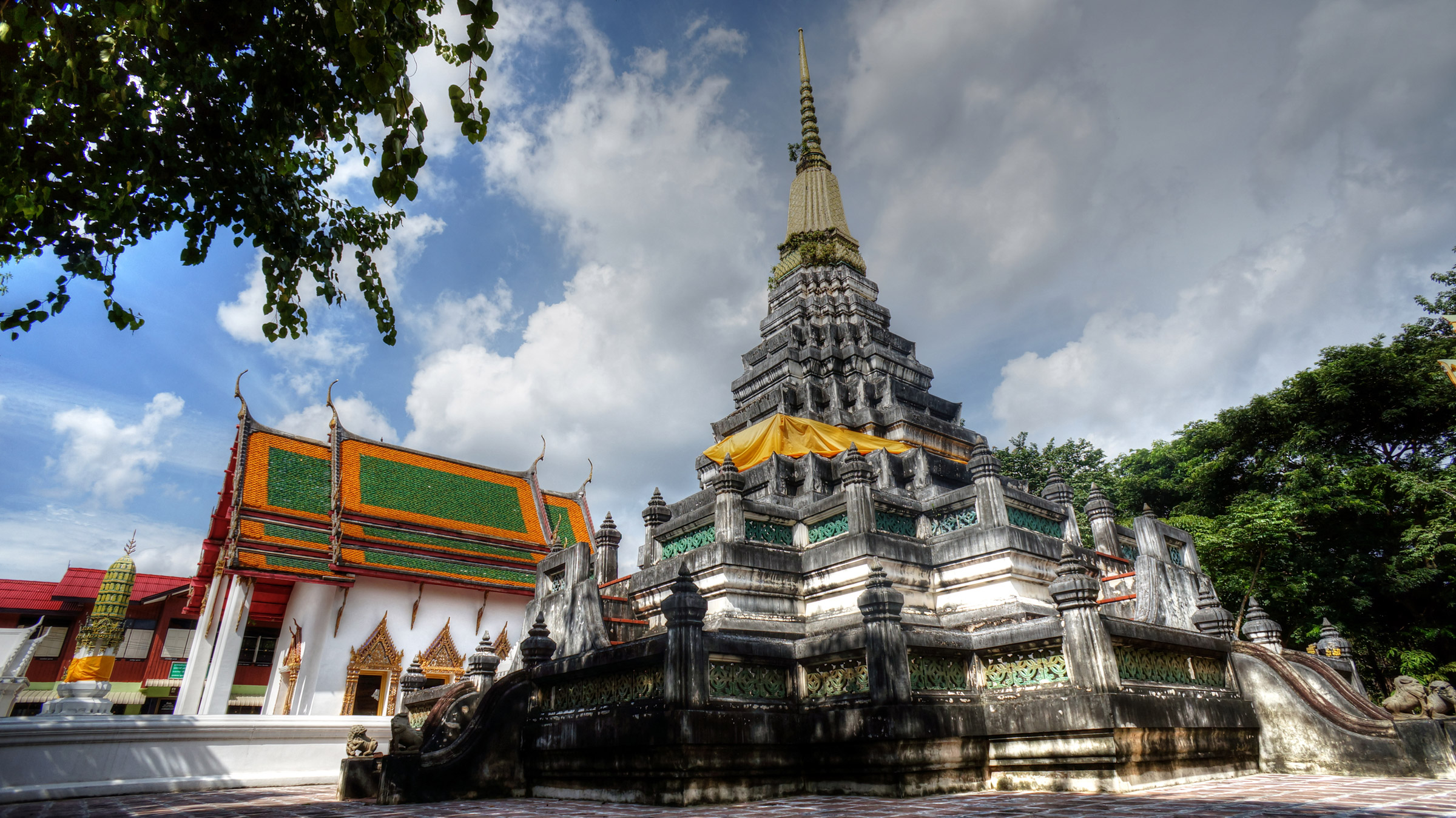 วัดโชติการาม / Wat Chotikaram